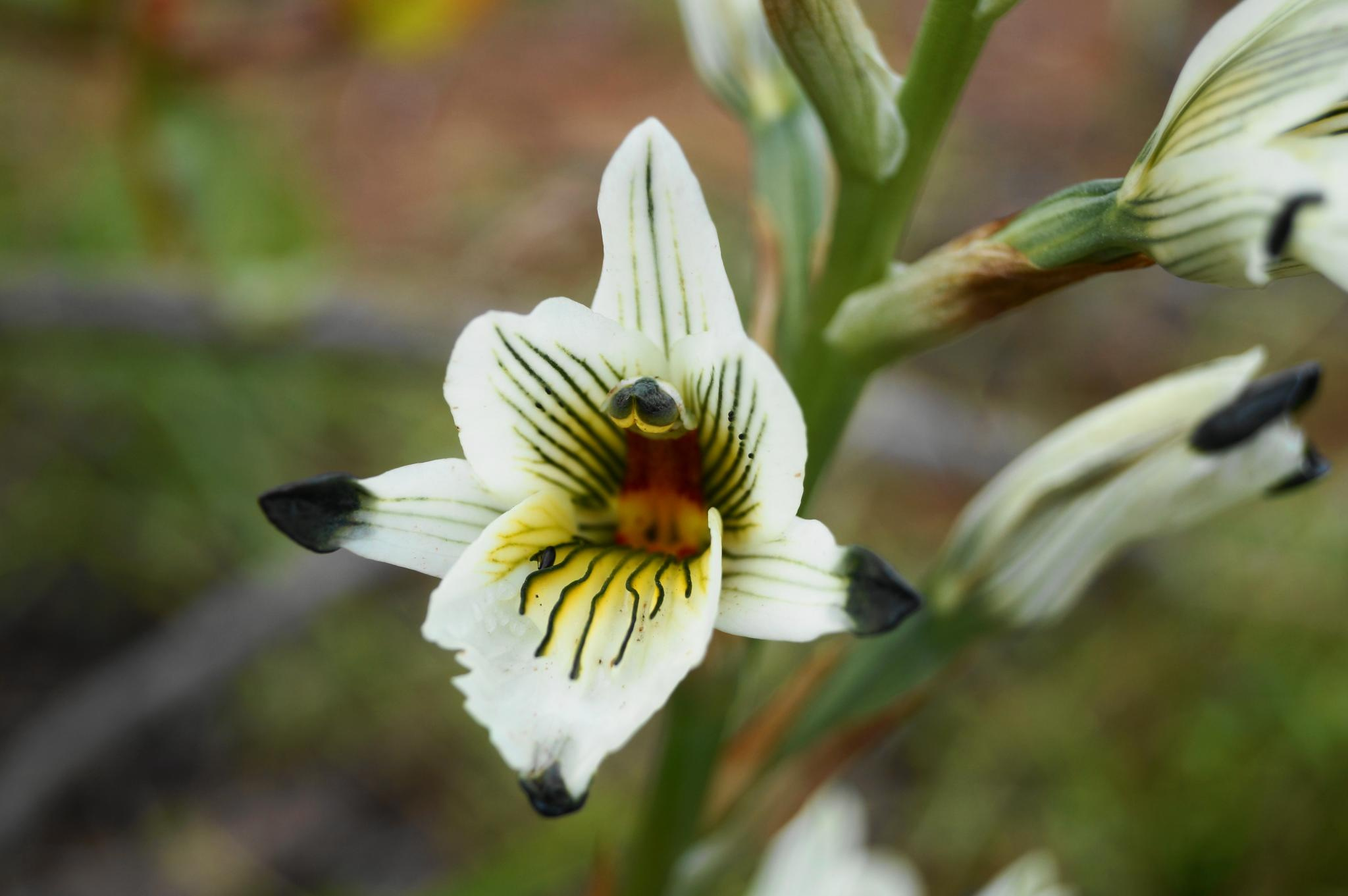 Cerros de Reñaca Alto, Viña del Mar